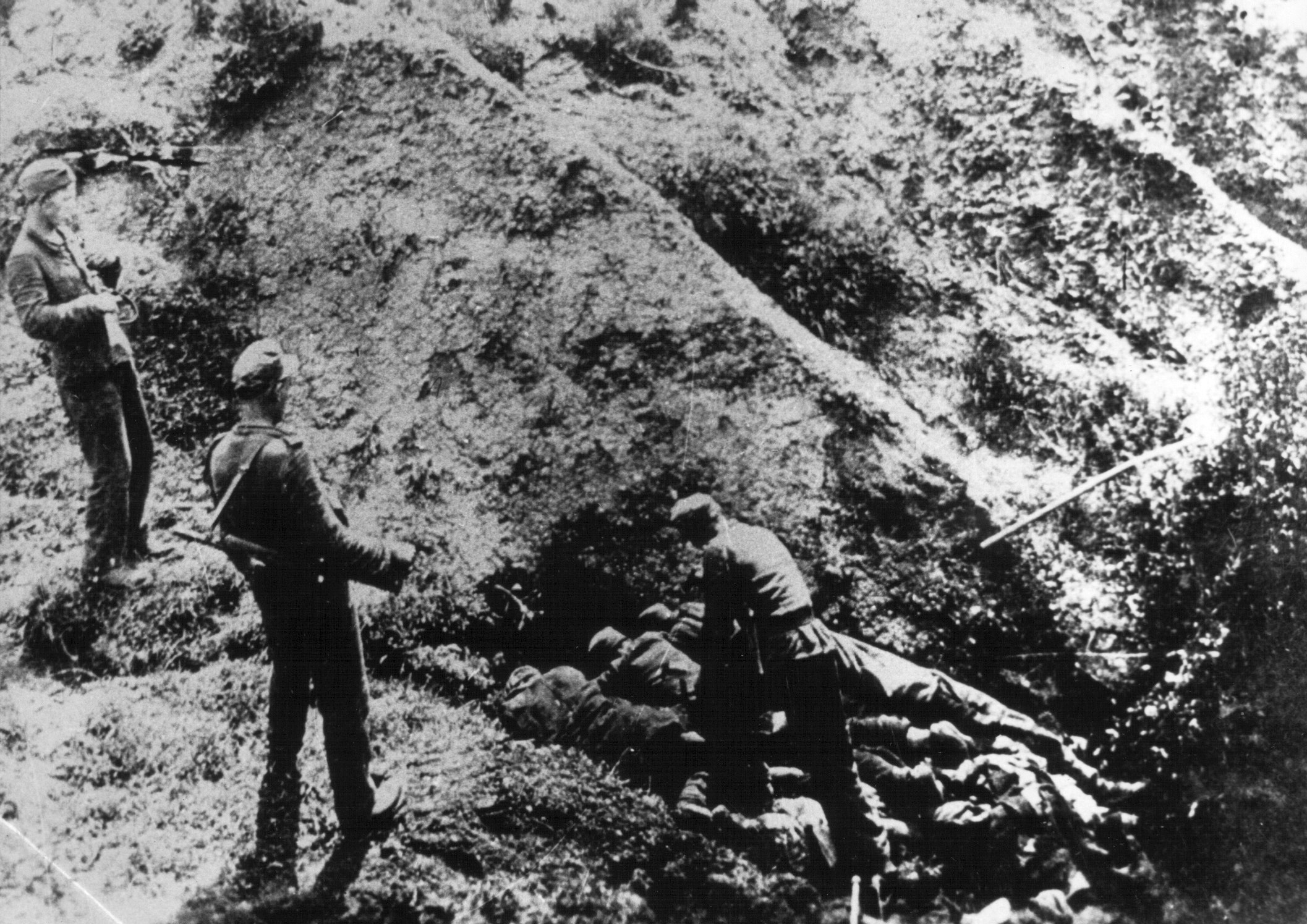 Srpskohrvatski / српскохрватски: Nemci ubijaju ranjene i iznemogle partizane na Sutjesci 1943.